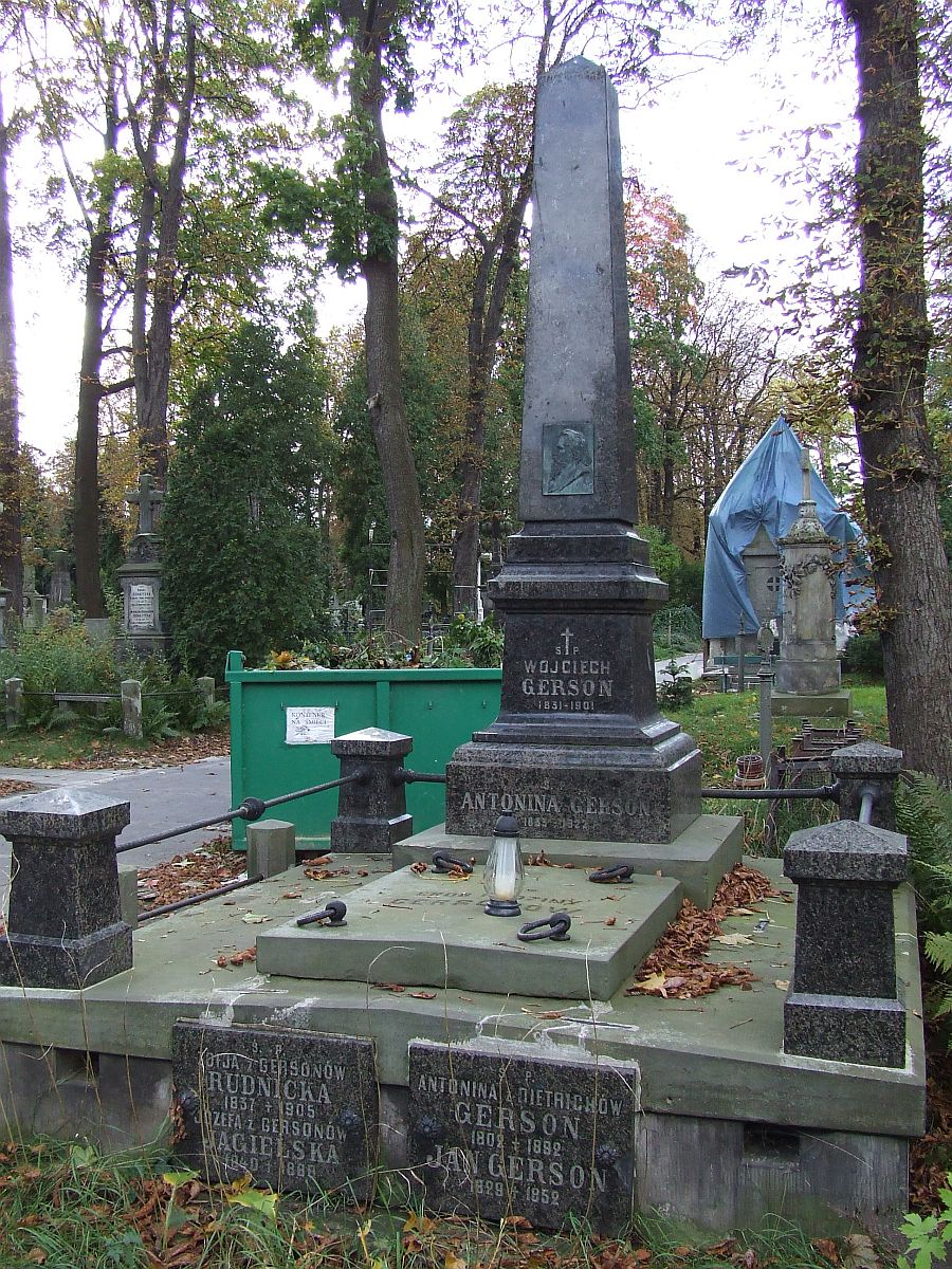 Wojciech Gerson tomb, Category:Cmentarz Ewangelicko-Augsburski w Warszawie